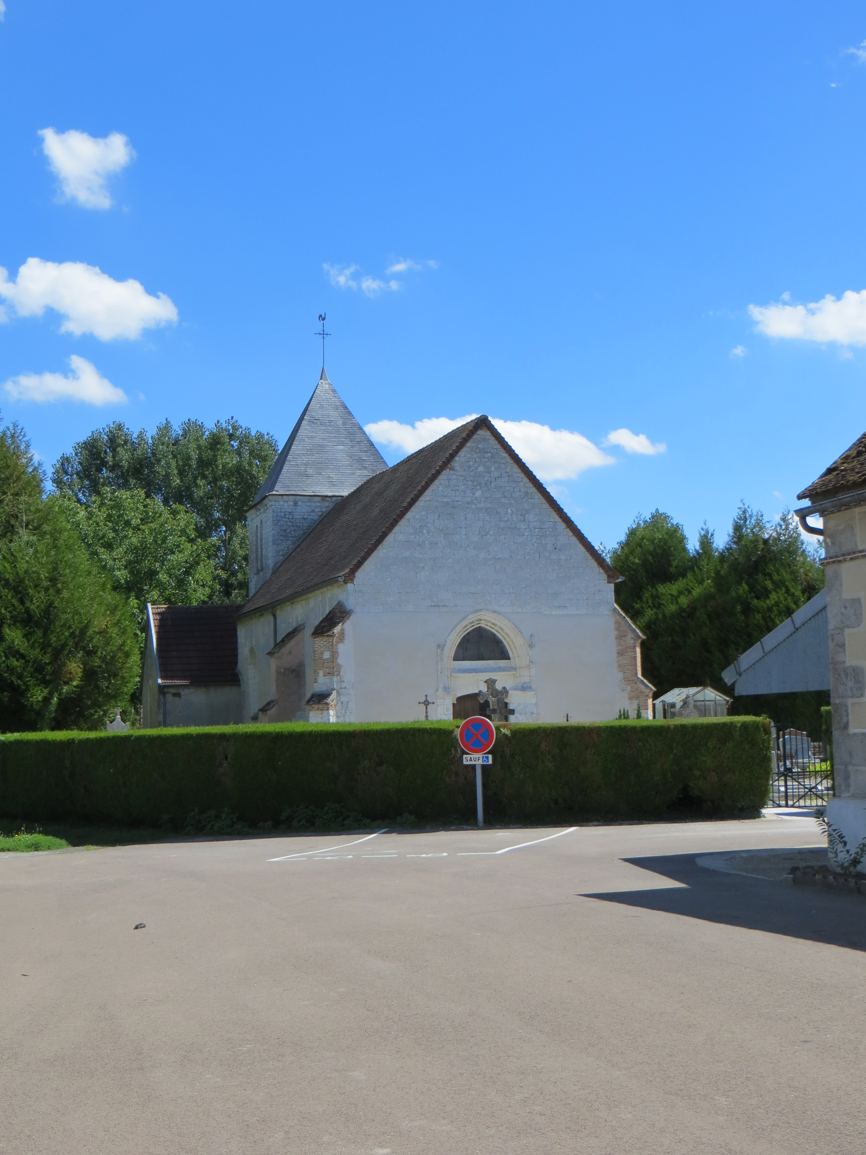 Vue générale de l'église